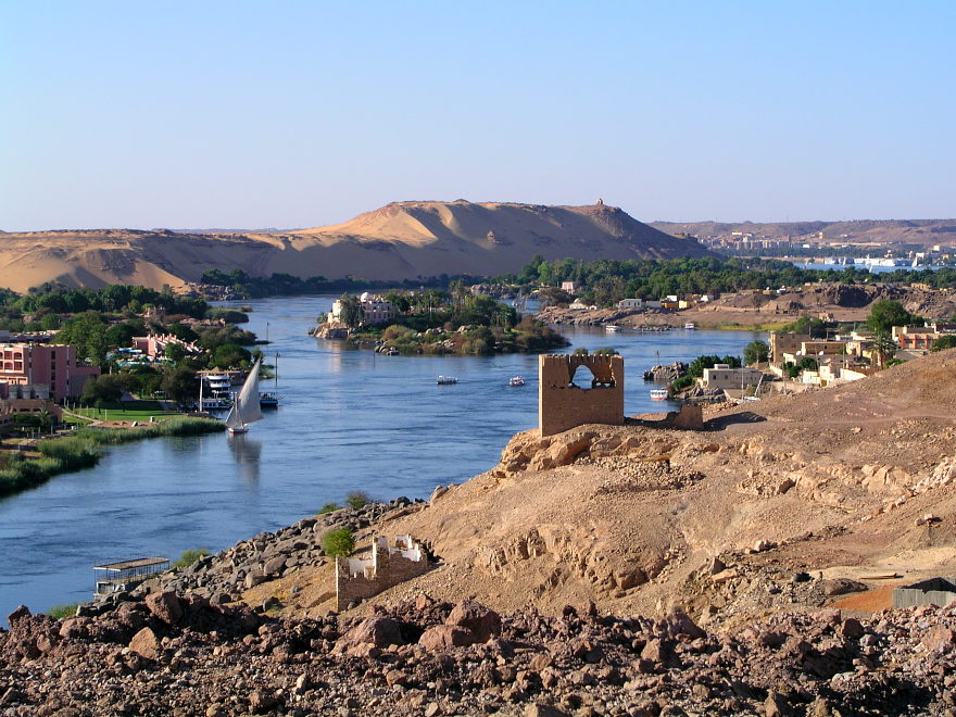 Nil bei Assuan, Aegypten